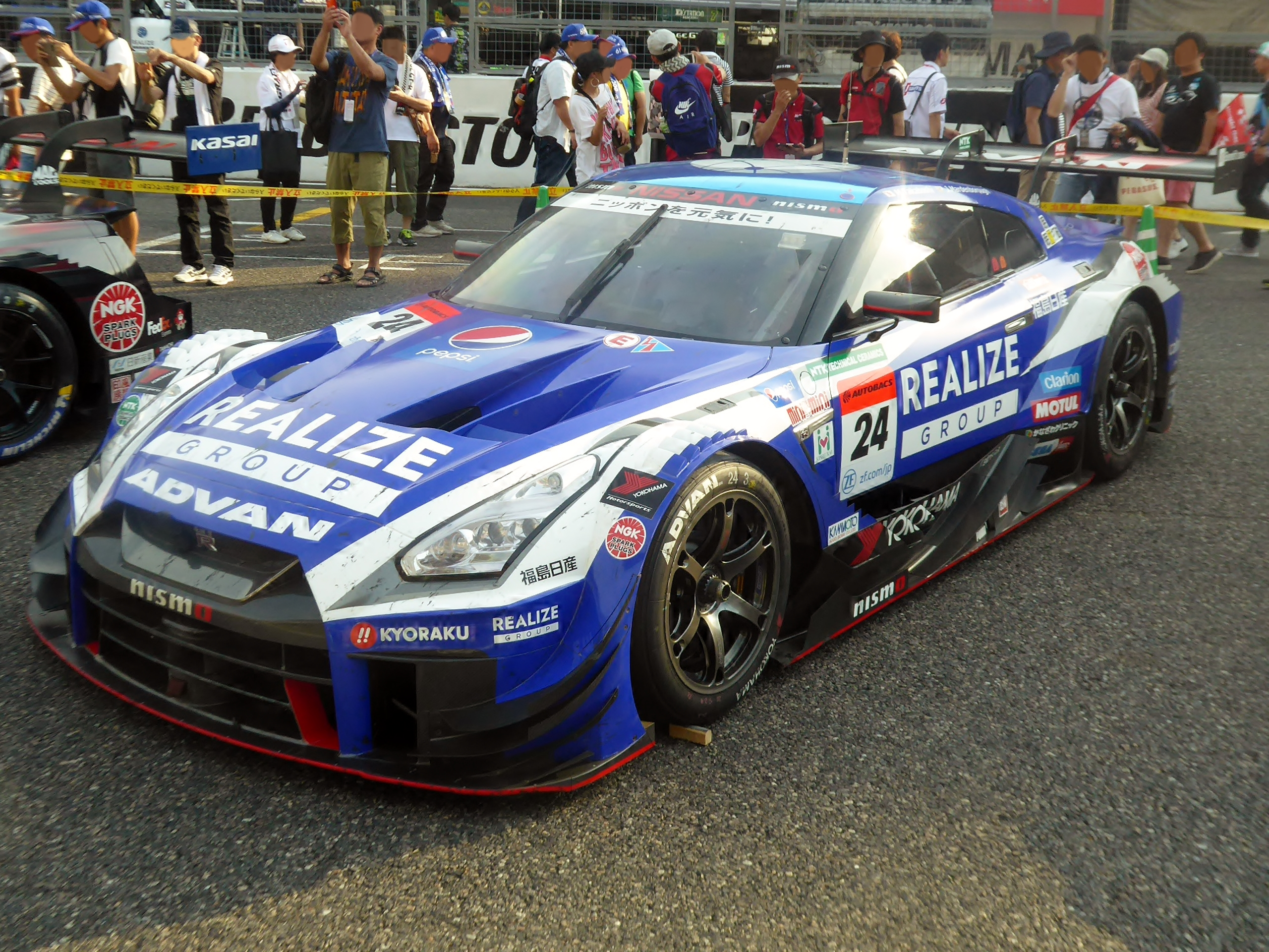 2019年鈴鹿GT300㎞終了後の24号車リアライズコーポレーションADVAN GT-Rを撮影。